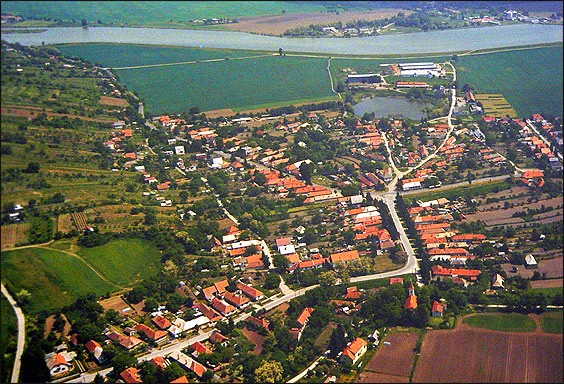 Obec Malé Kozmálovce, letecký snímok obce smerom na východ, hore je rieka Hron (vodná nádrž) Hať Veľké Kozmálovce